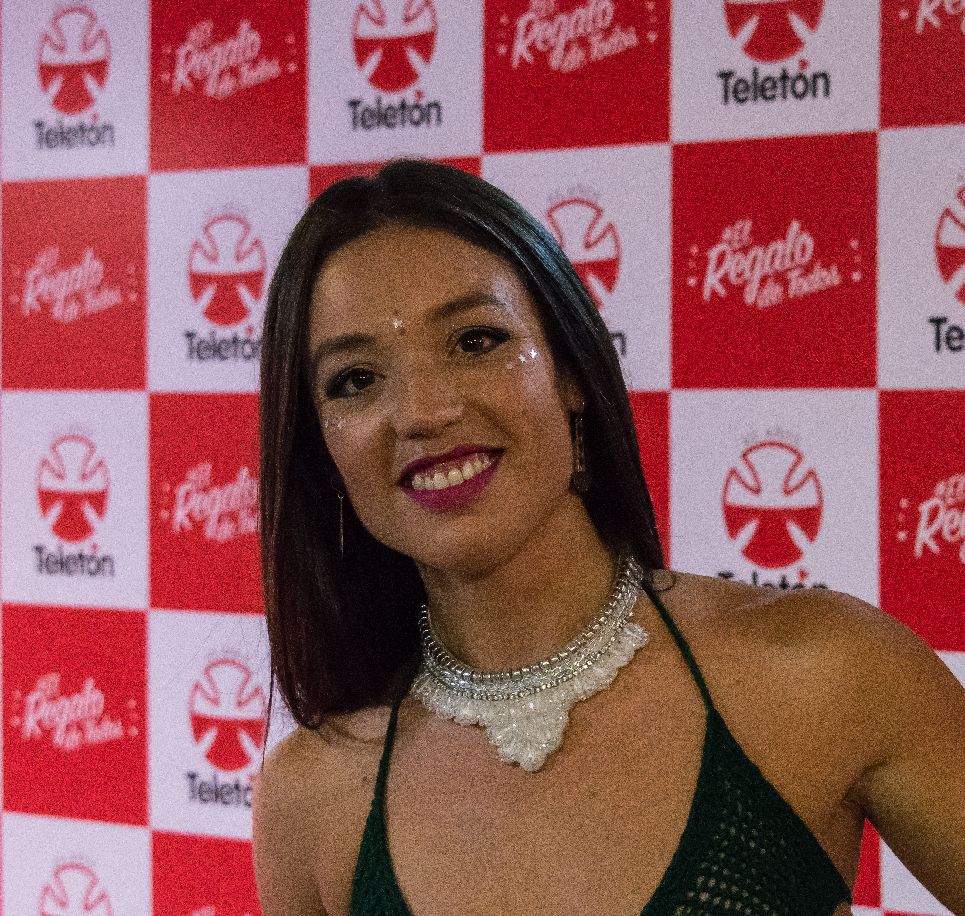 Astrid Veas, Teletón 2018, Teatro Teletón, Santiago, Chile.